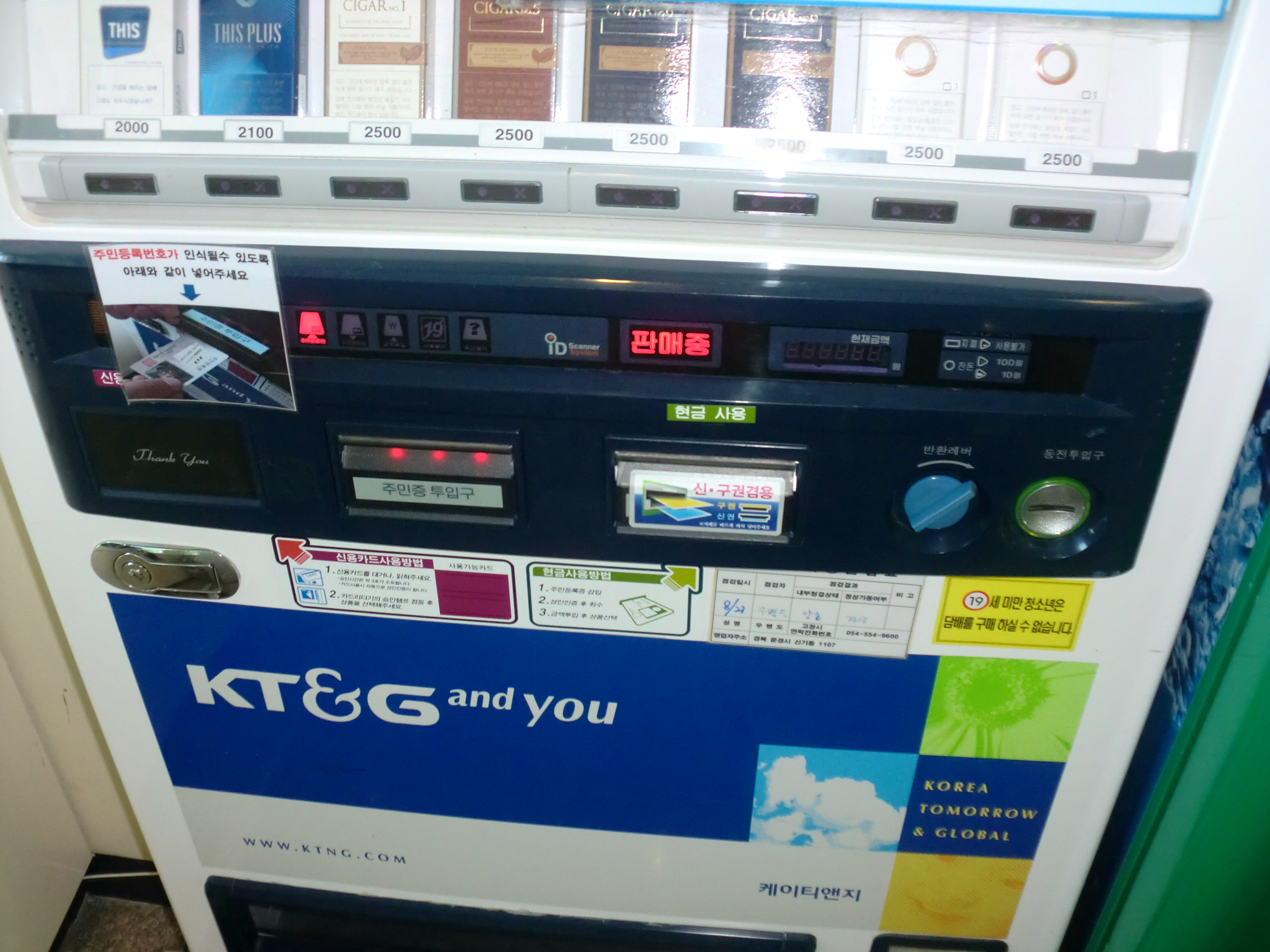 문경운전면허시험장에 있는한국의 담배자동판매기(식별기능부)의 식별부분